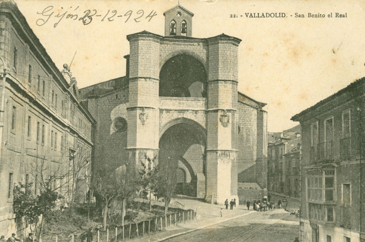 Iglesia de San Benito. Fachada - Valladolid - Postal Color